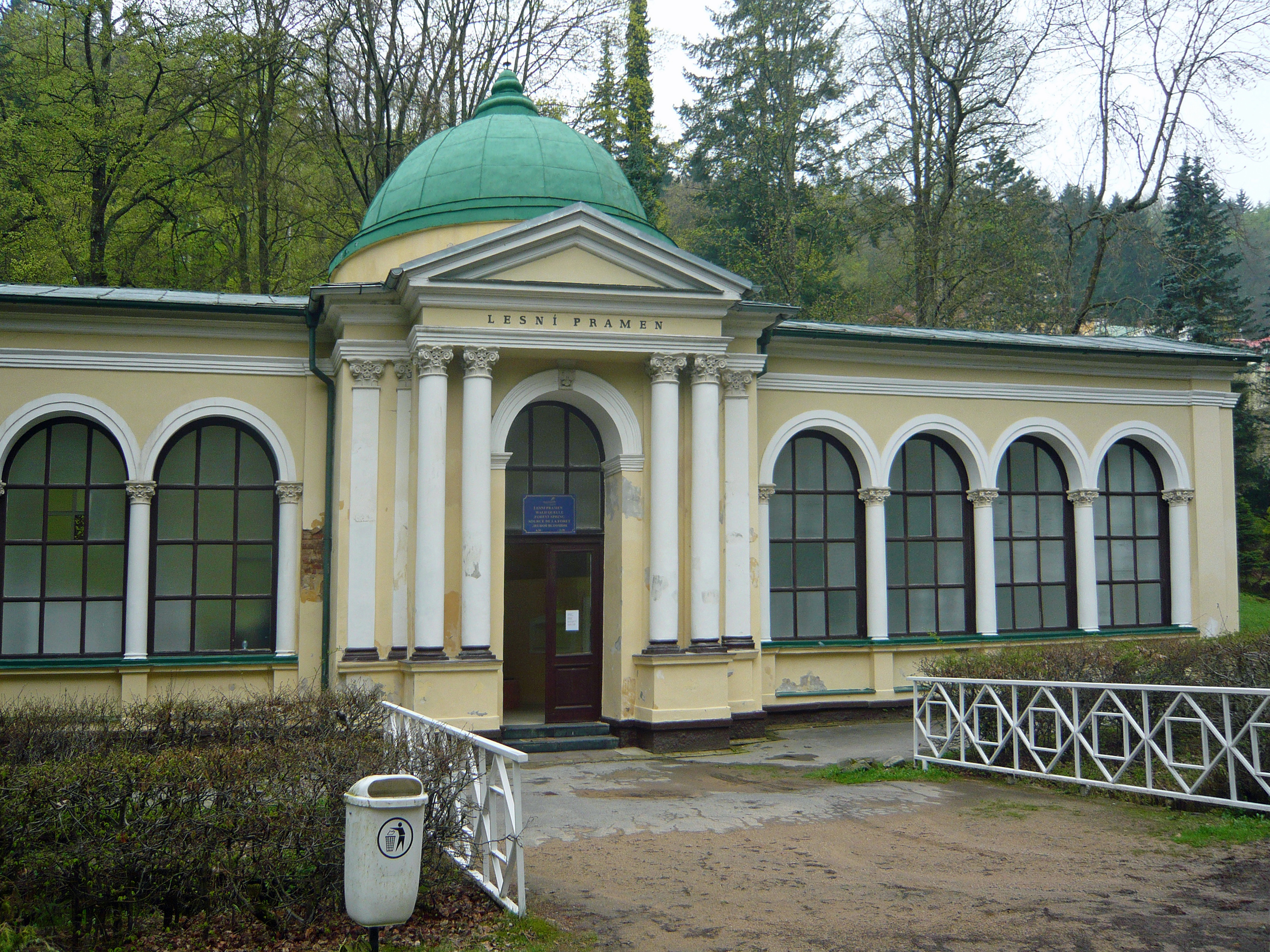 Lesní pramen, Mariánské Lázně